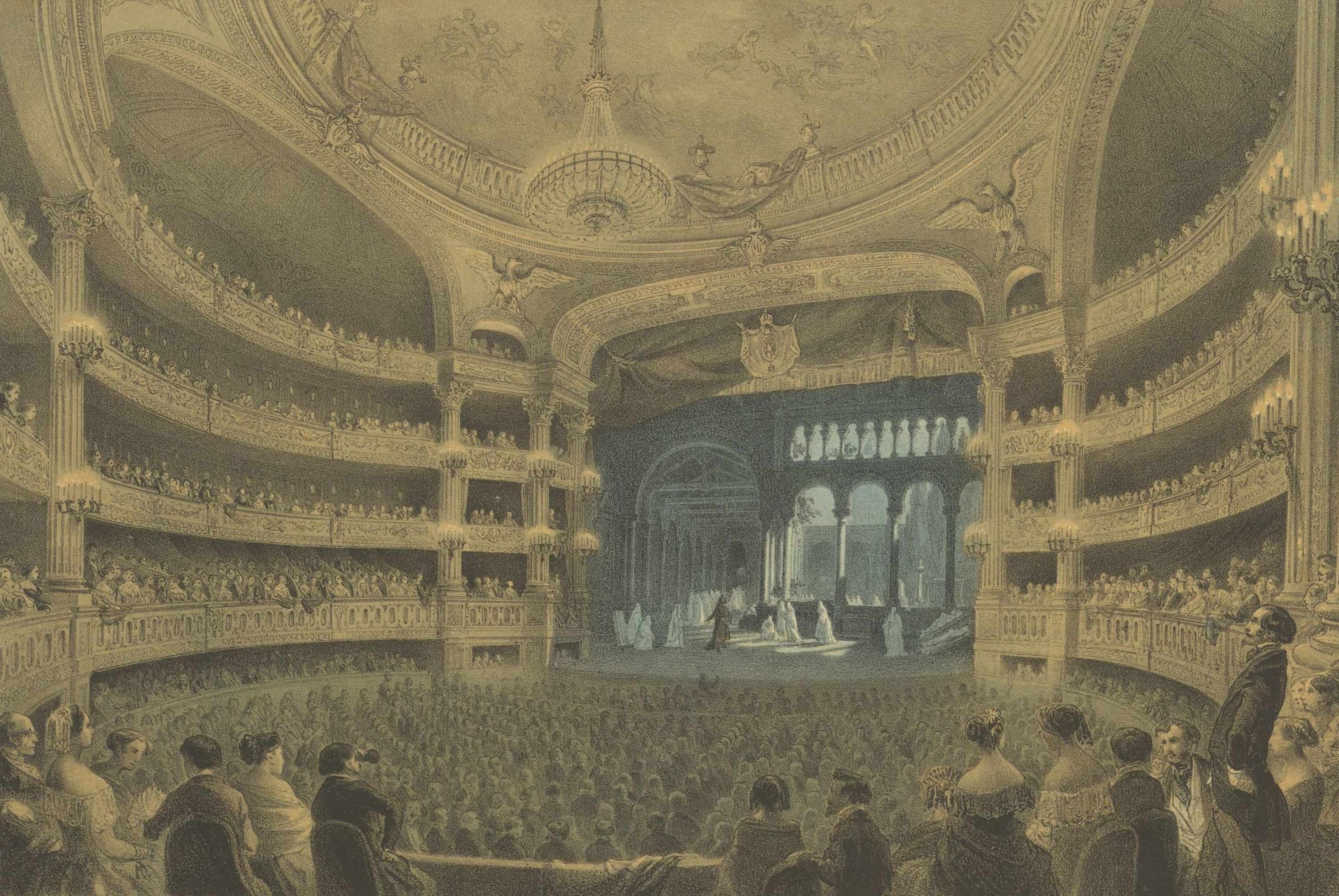 Performance of the première production (21-11-1831) of Giacomo Meyerbeer's Robert le diable at the Académie impériale de Musique, Théâtre de l'Opéra. 15 x 25 cm